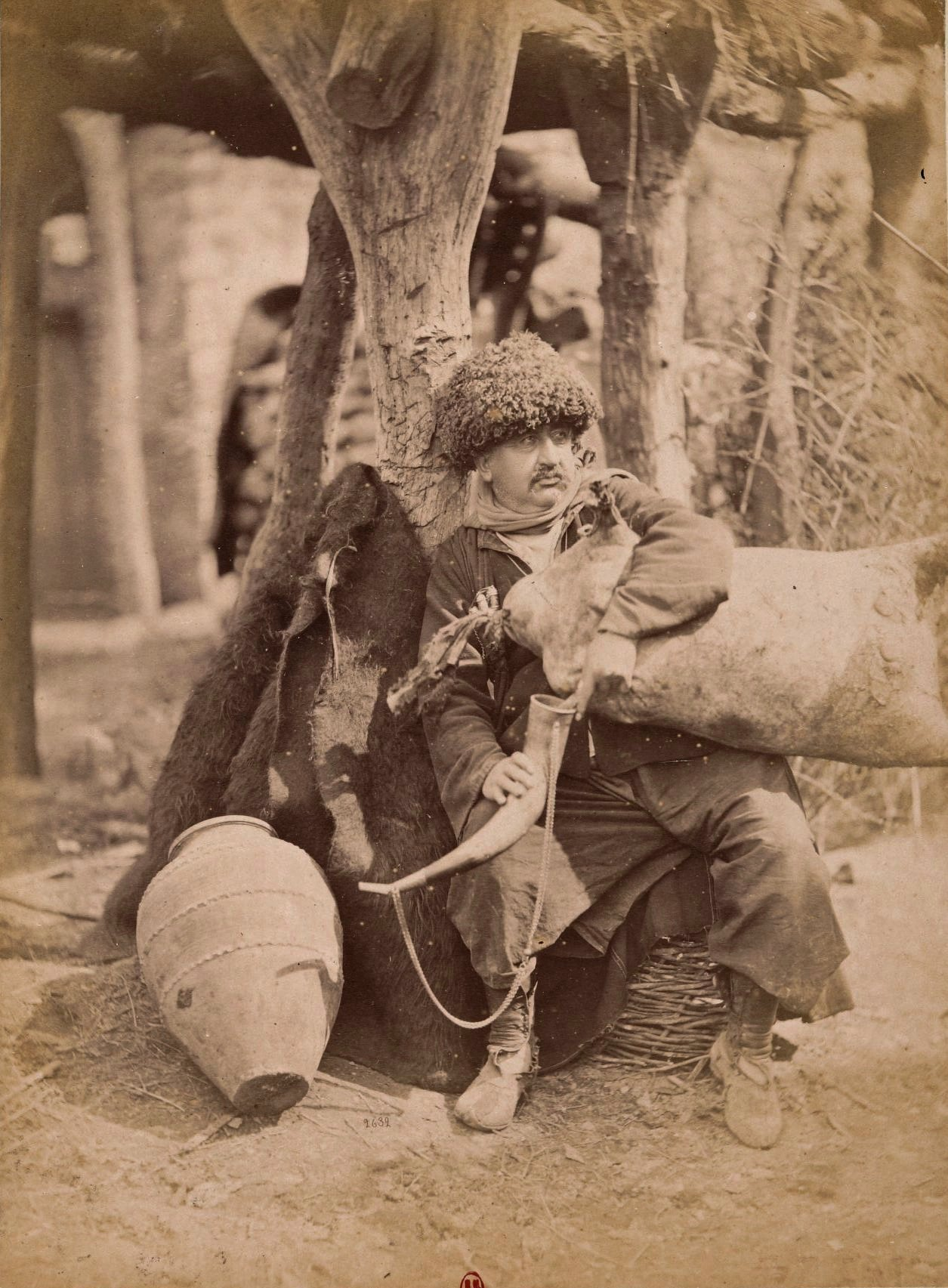 Barry (capitaine). F. 2. Arménien, Tiflis (Tbilissi). Mission scientifique de Mr Ernest Chantre. 1881